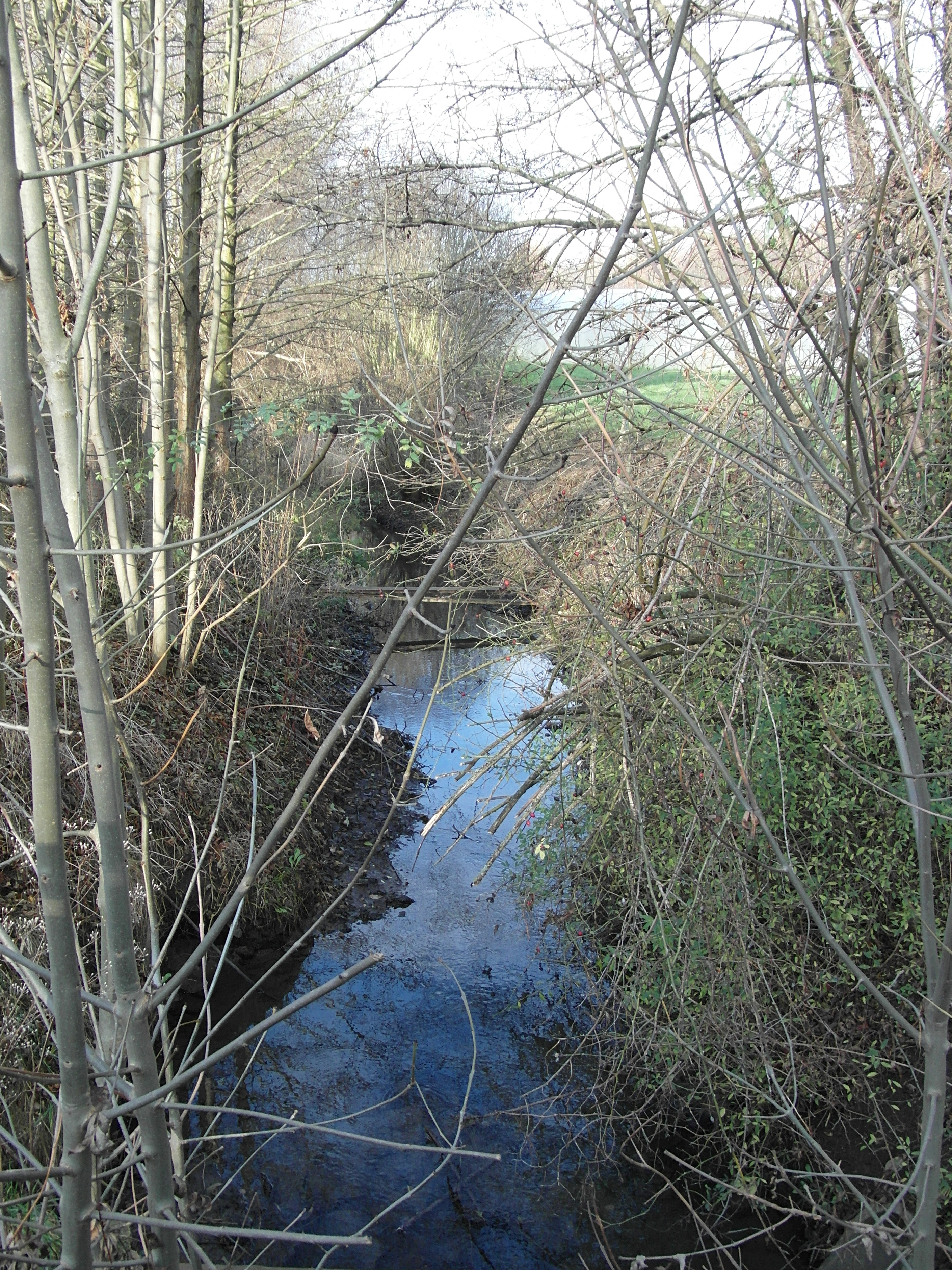 Der Hirtenbach zwischen der Bundesstrasse 217 und der Hauptstrasse in Wettbergen